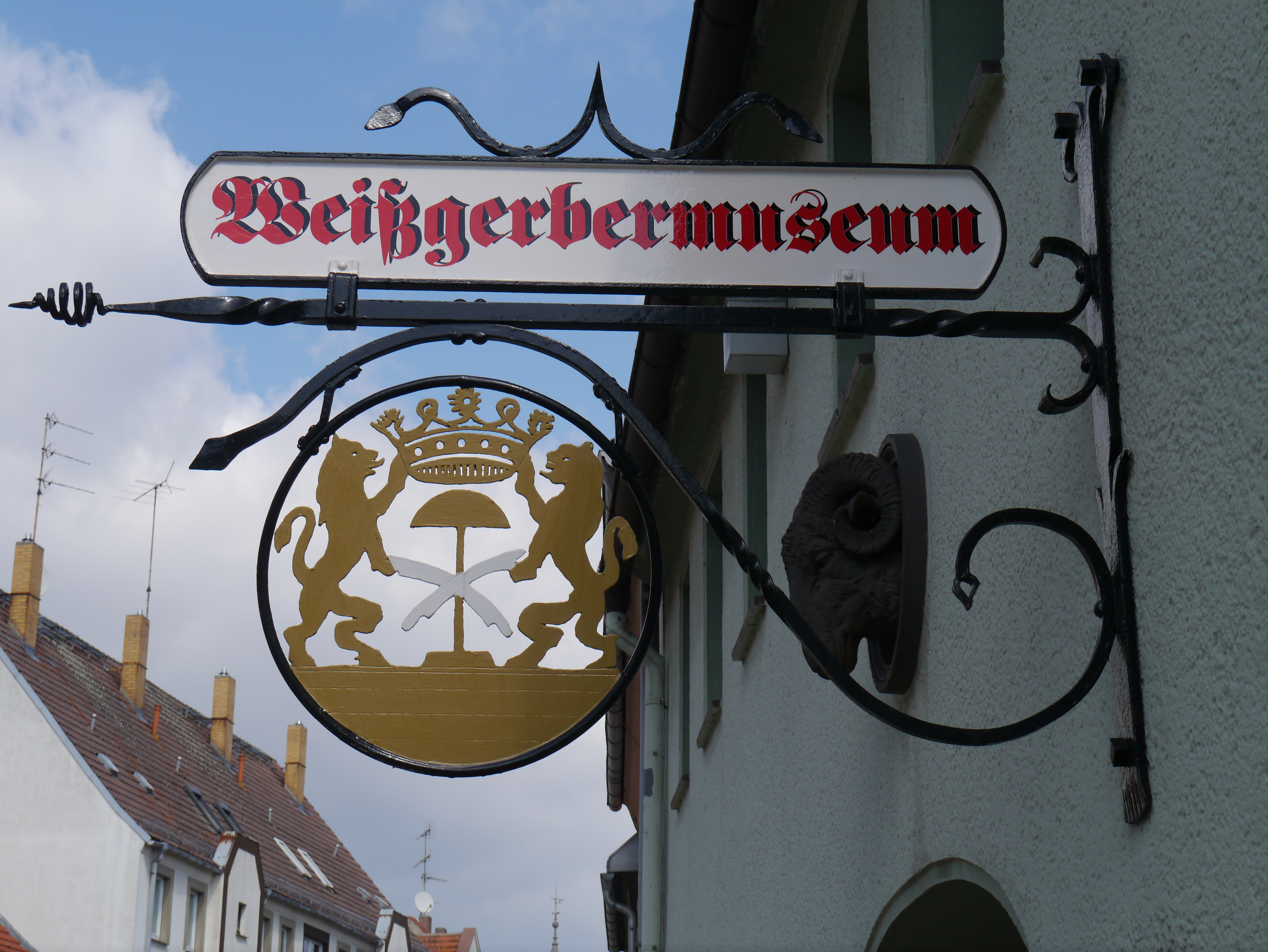 Weißgerbermuseum in Doberlug-Kirchhain (OT Kirchhain), Baudenkmal.